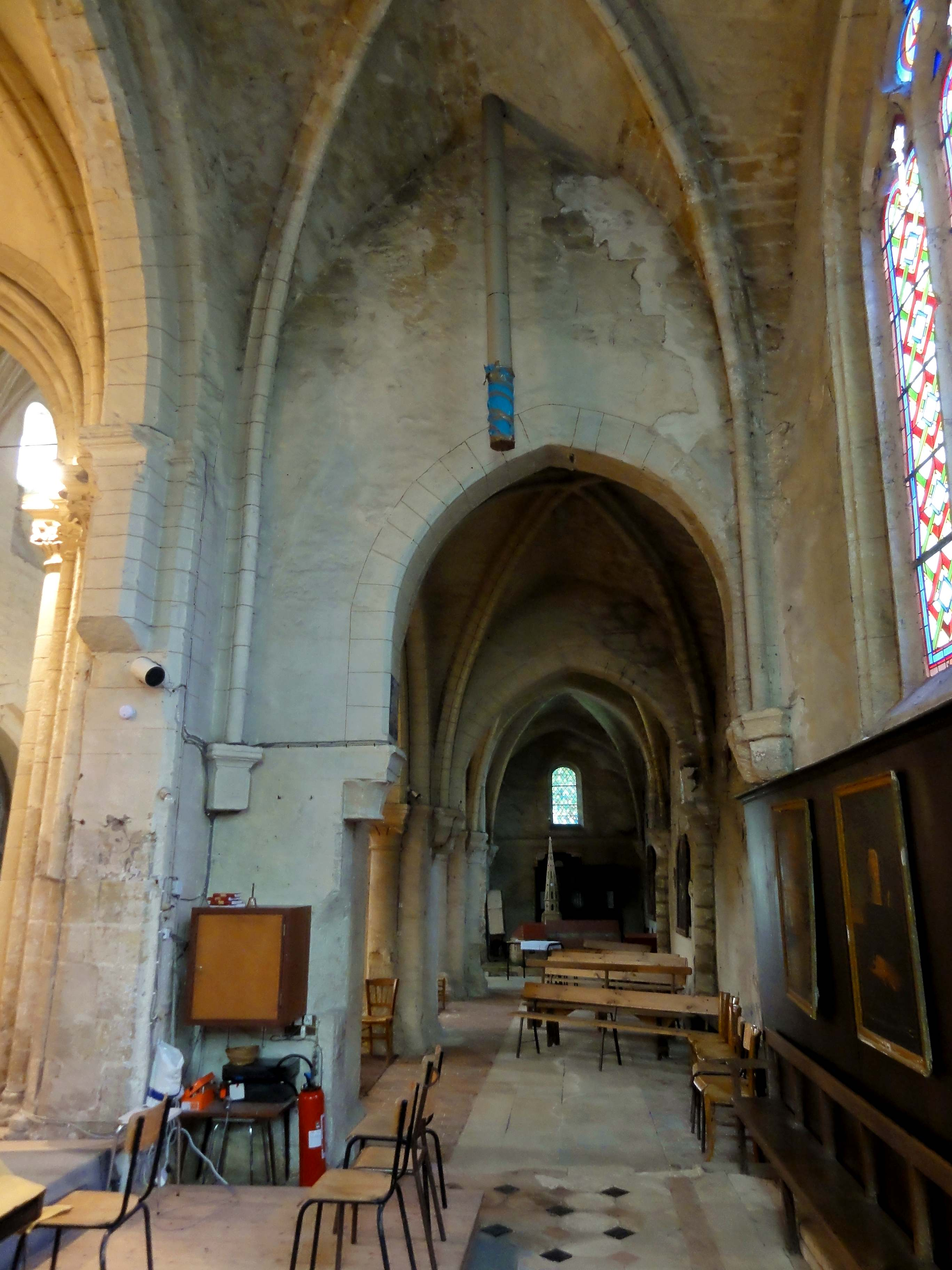 Intérieur de l'église Saint-Pierre-et-Saint-Paul (voir titre).